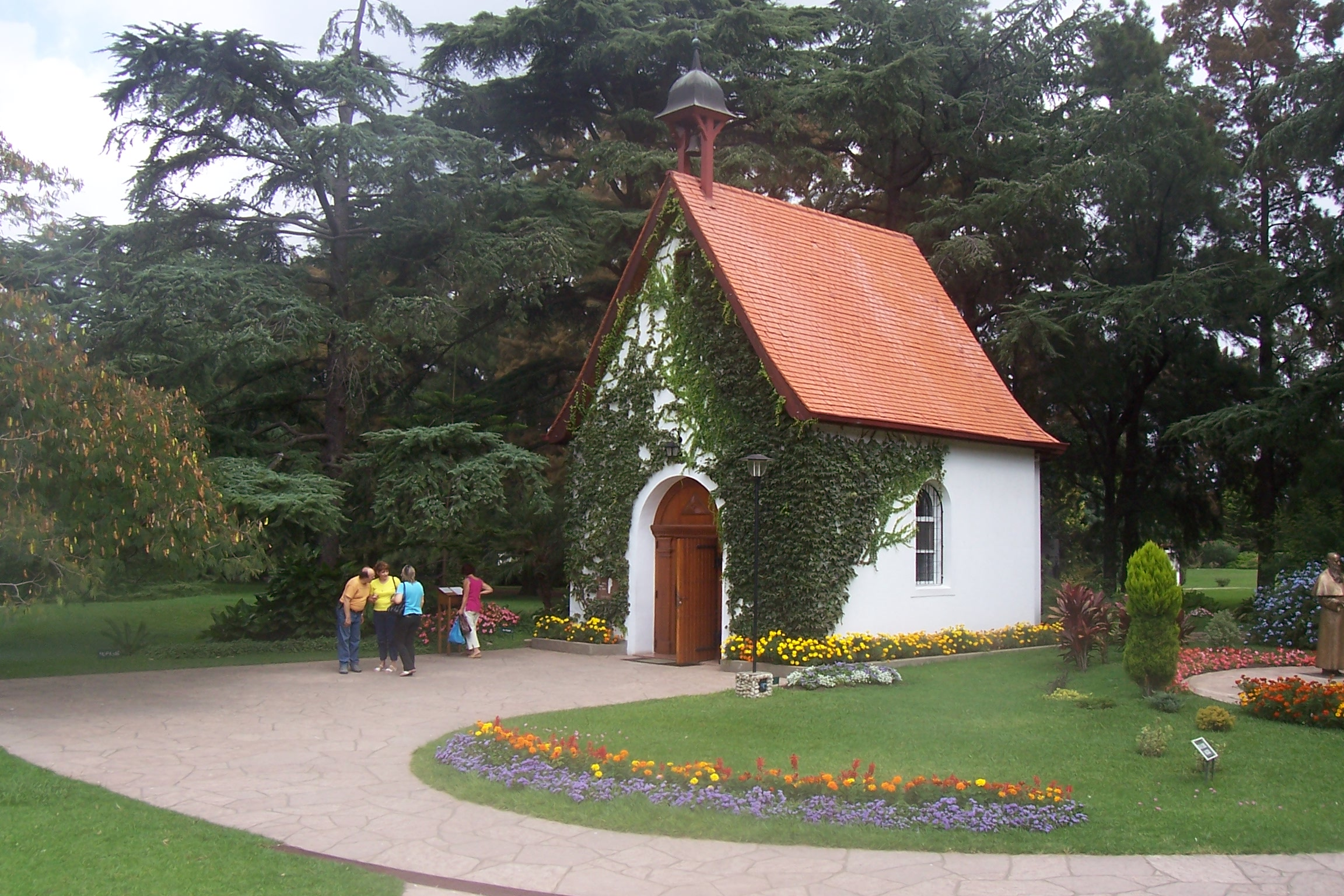 Santuario Nacional del Movimiento apostólico de Schönstatt, ubicado en la localidad de Florencio Varela, en la provincia de Buenos Aires, escasos kilómetros de la capital del país.